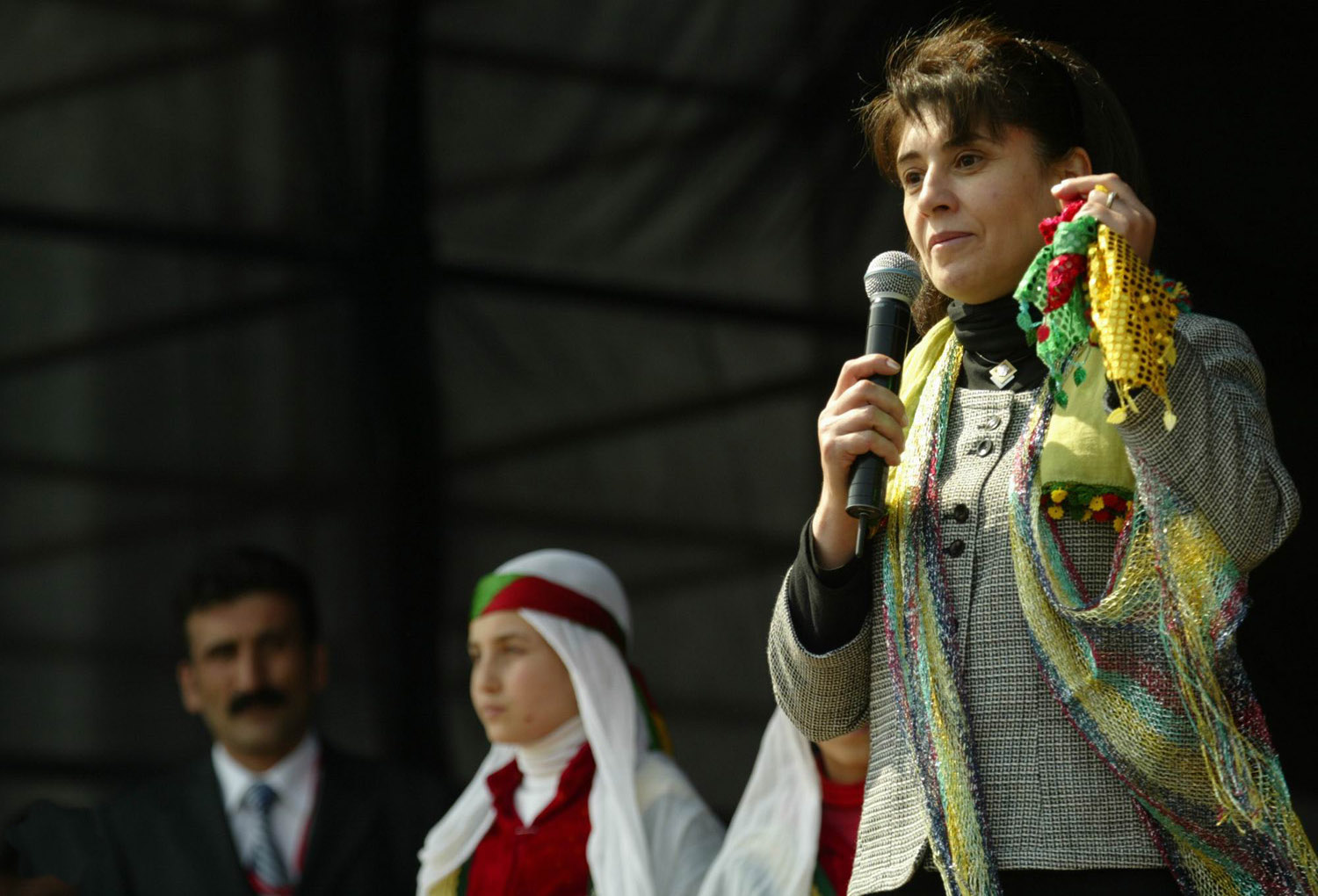 Leyla Zana (3ê Gulana 1961ê- ) siyasetmedareka Kurd e ko piştî sonda qanûnî li perlemana Tirkiyê, bi Kurdî axivt û ji ber wê û ji ber bizavên wê siyasî jibo doza Kurdî li Tirkiyê kevt girtîgehê. Ew sembola berxwedana aştîxwaz ya Kurdan li Tirkiyê ye. Li sala 1995ê, Parlementoya Ewropayê xelatê navdarê Saxarof Xelat da Leylayê, lê heta sala 2004ê ew ji ber zîndanîbûna xwe neşîya wî xelatî werbigirit.